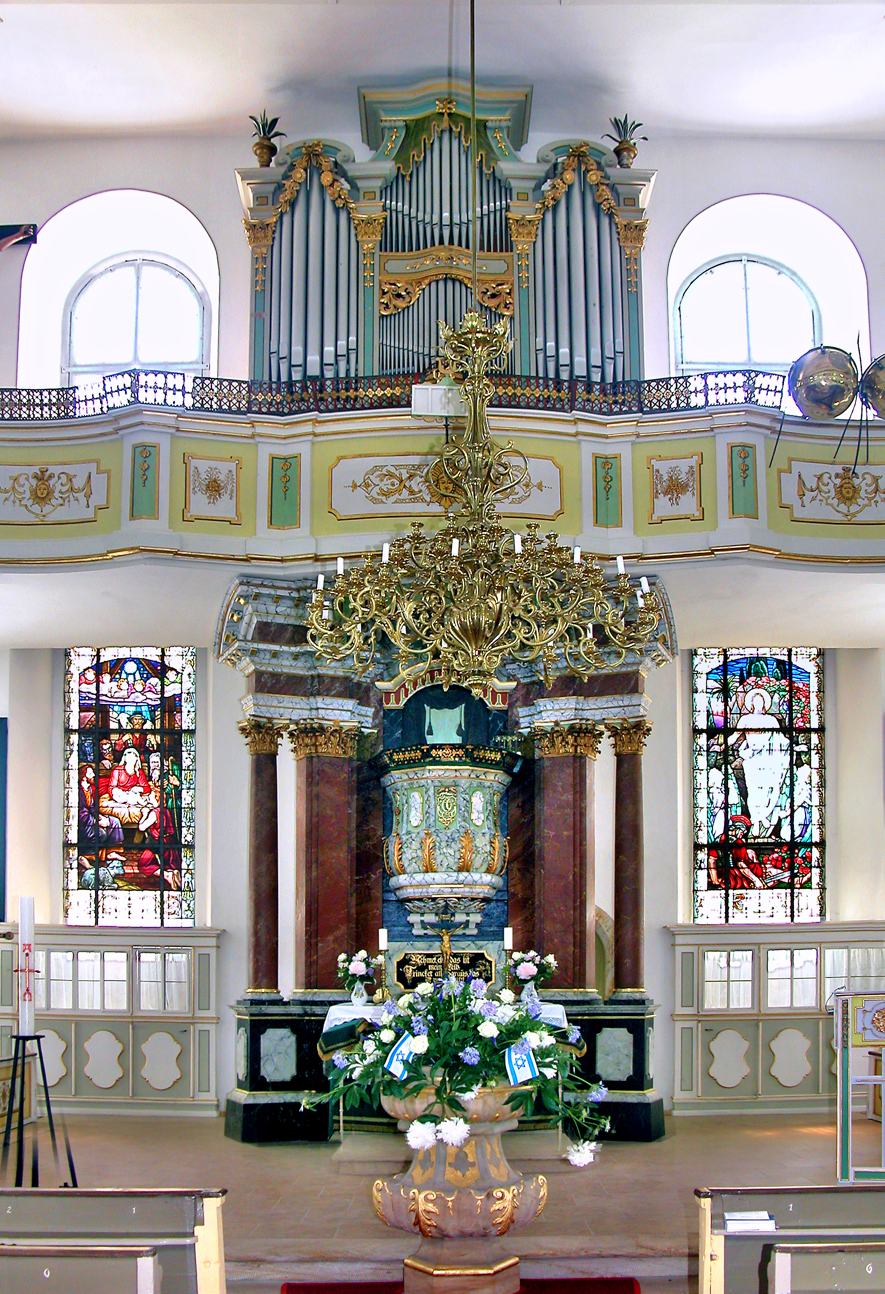 22.06.2008 01738 Pretzschendorf (Klingenberg), Freiberger Straße (GMP: 50.871572,13.524186): Barocke Dorfkirche (1732-1734 von J. Christian Simon), gestreckter, achteckiger Grundriß. Kanzelaltar aus der Entstehungszeit. Die Orgel, die dritte in Pretzschendorf, ist 1906 von der Dresdner Firma Gebrüder Jehmlich mit 1637 Pfeifen gebaut worden. Der Orgelprospekt stammt noch aus der Zeit des Kirchenausbaus. [DSCN33199&33200.TIF]20080622115MDR.JPG(c)Blobelt